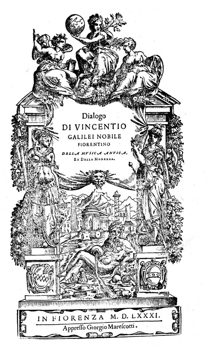 Dialogo di Vincentio Galilei ... della musica antica, et della moderna. - In Fiorenza : appresso Giorgio Marescotti, 1581. - [4], 149, [11] p. : ill., mus. ; fol. .